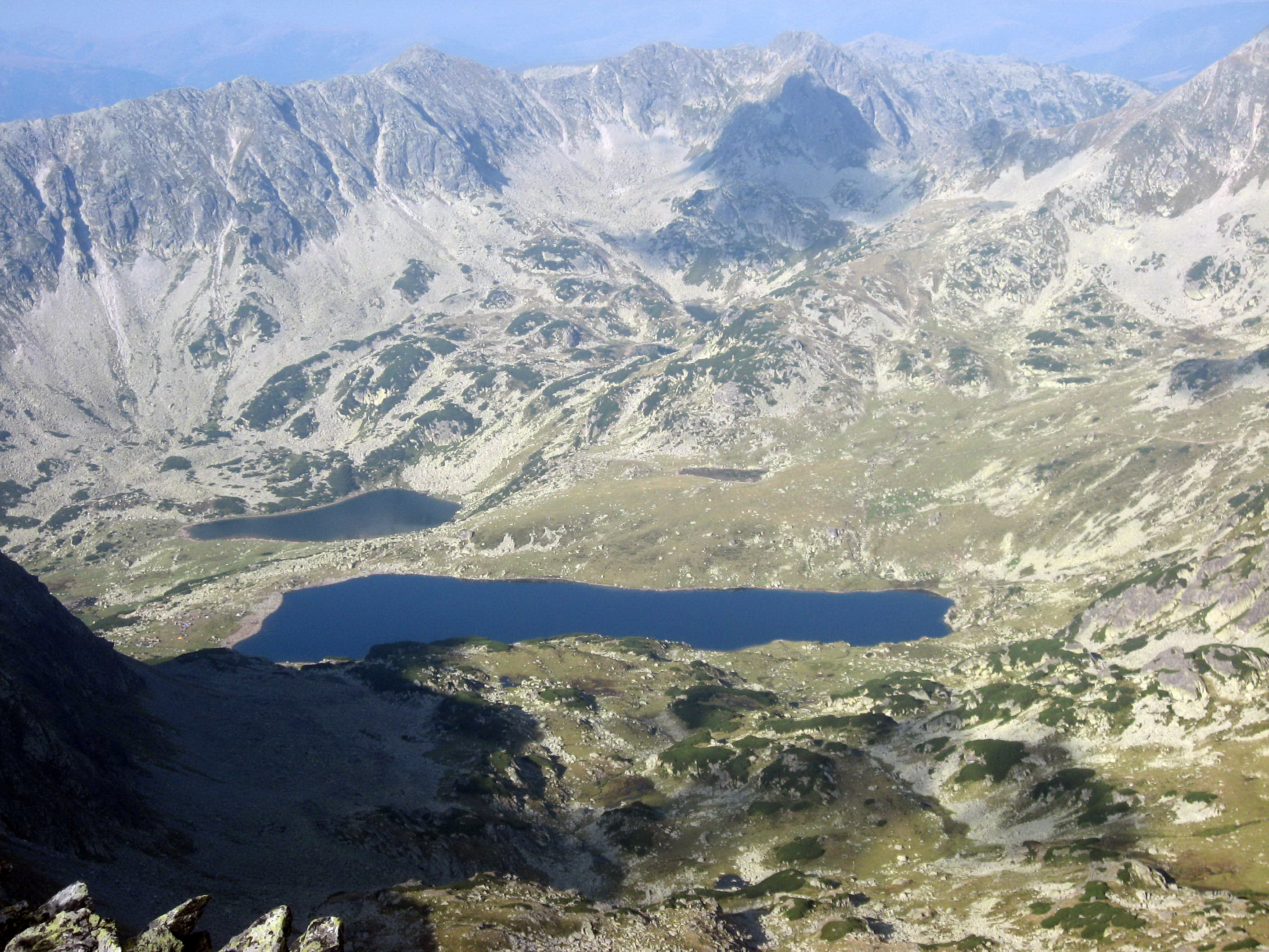 Jezera: Lacul Bucura (největší), Lacul Ana a Lacul Bucurelu (nejmenší)